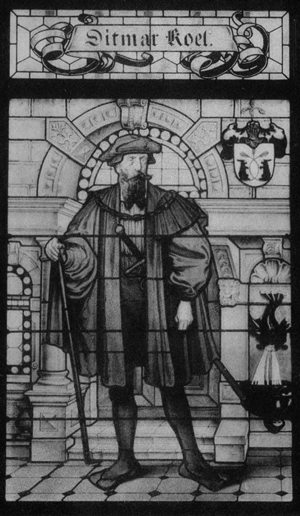 Close-up of picture of Hamburg Mayor Ditmark Koel, painted on glass